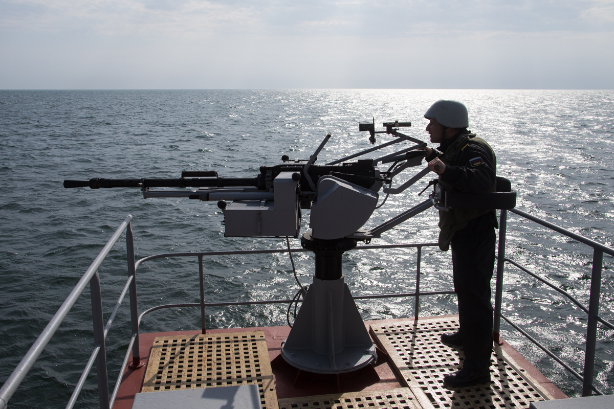 МТПУ 14,5 мм морская тумбовая пулемётная установка.